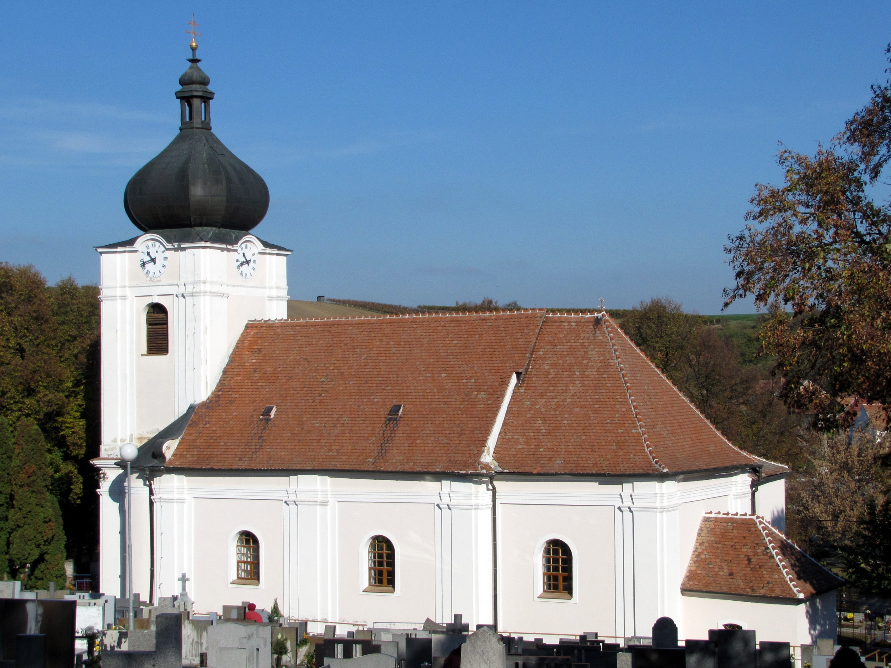 Kostel sv. Jana Křtitele v Hovoranech, okres Hodonín